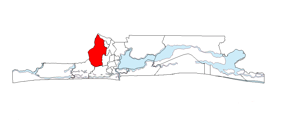 Ubicacion de Alimosho en el Estado de Lagos